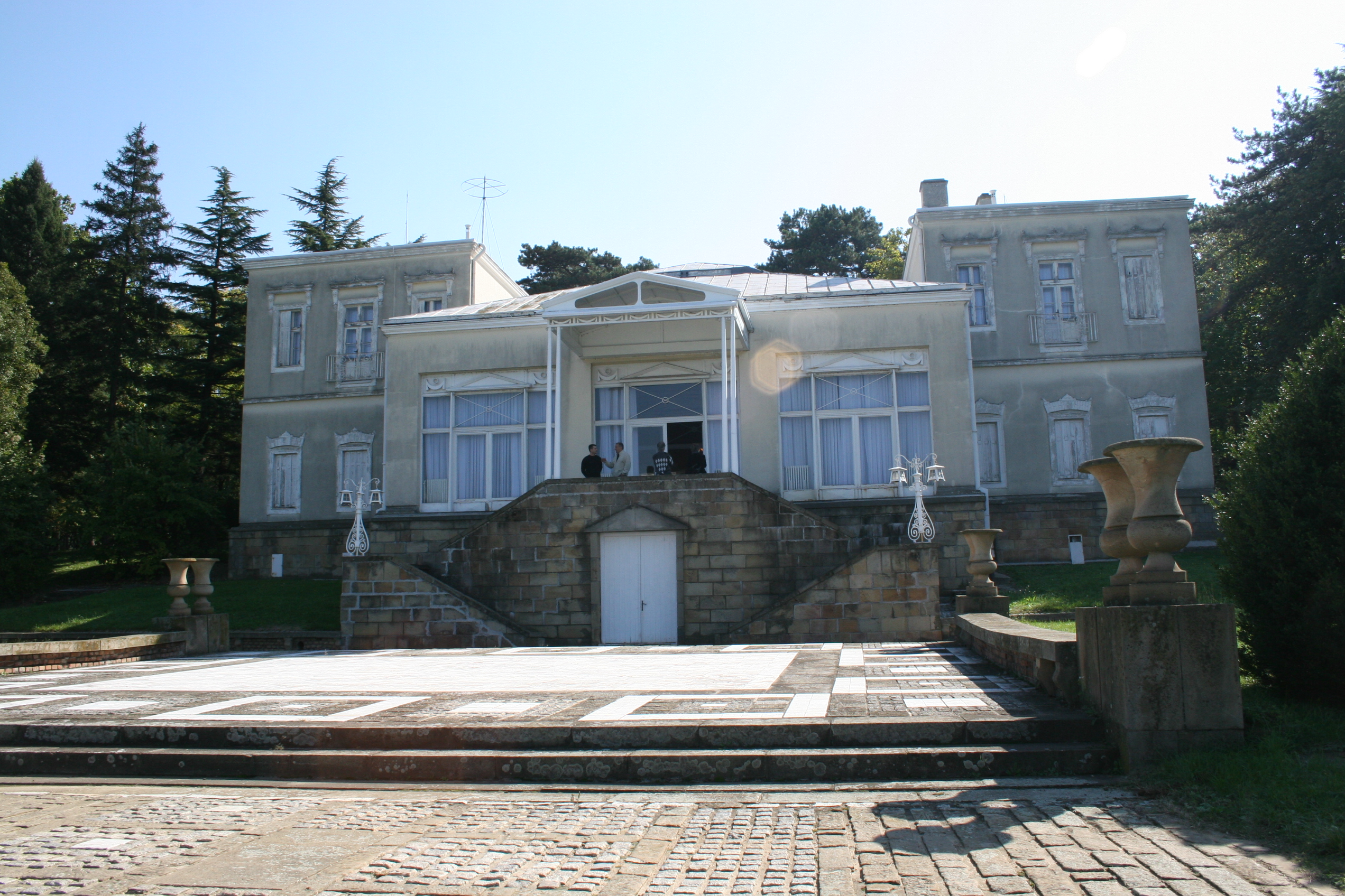 Vila "Zlatni breg" - Obrenovićeva vila u Smederevu.